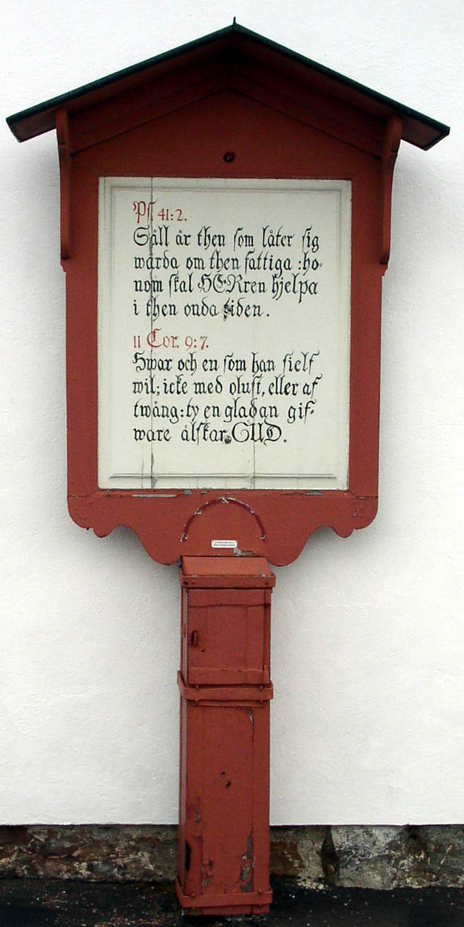 Fattigbössa vid Rättviks kyrka, Dalarna. Ps 41:2 Säll är then som låter sig wårda om then fattiga : ho- nom skal HERren hjelpa i then onda tiden. II Cor. 9:7. Hwar och en som han sielf wil; icke med olust, eller af twång. ty en galdan gif- ware älskar GUD.